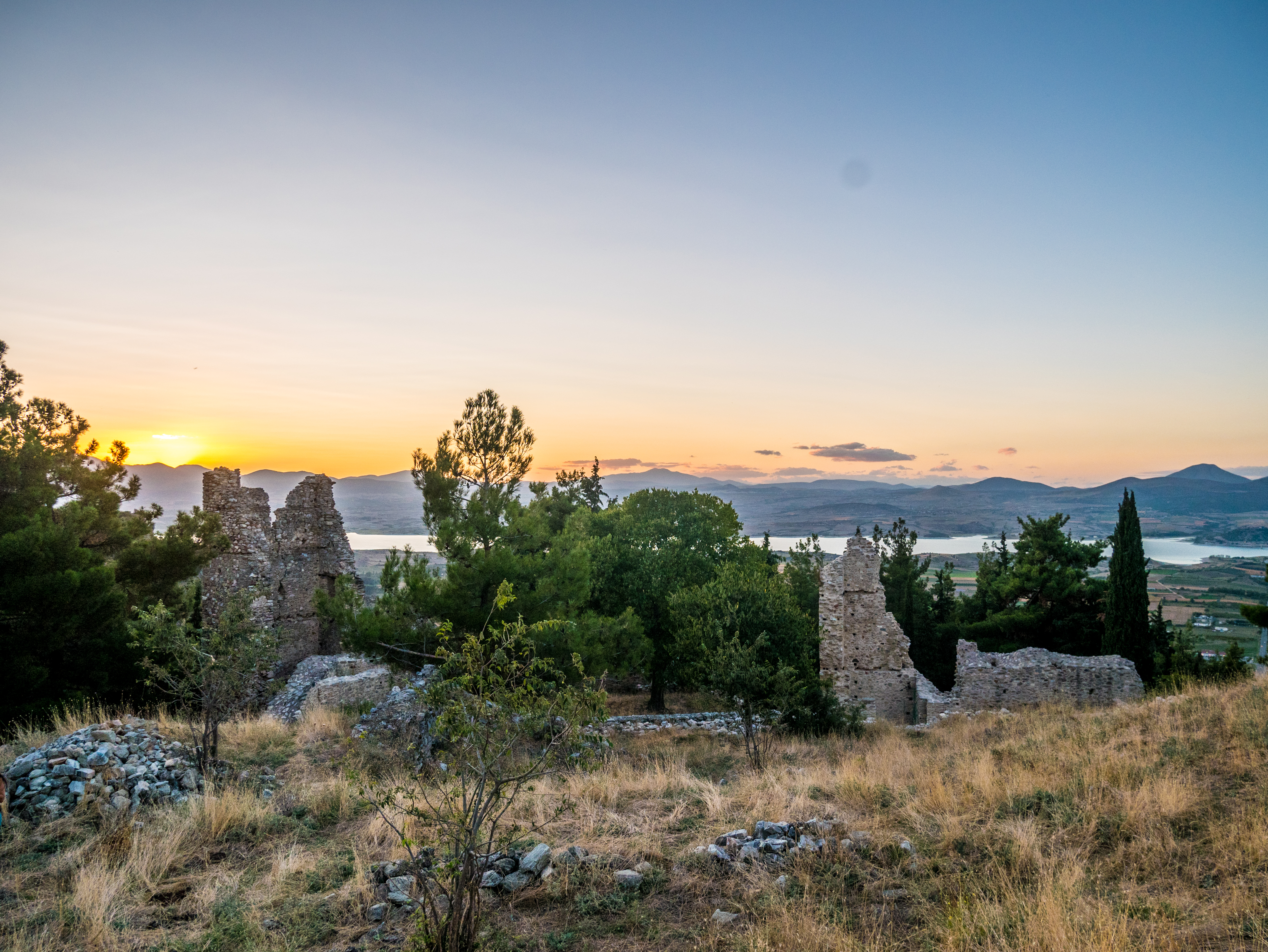 Βυζαντινό κάστρο Σερβίων«Βυζαντινό κάστρο Σερβίων»